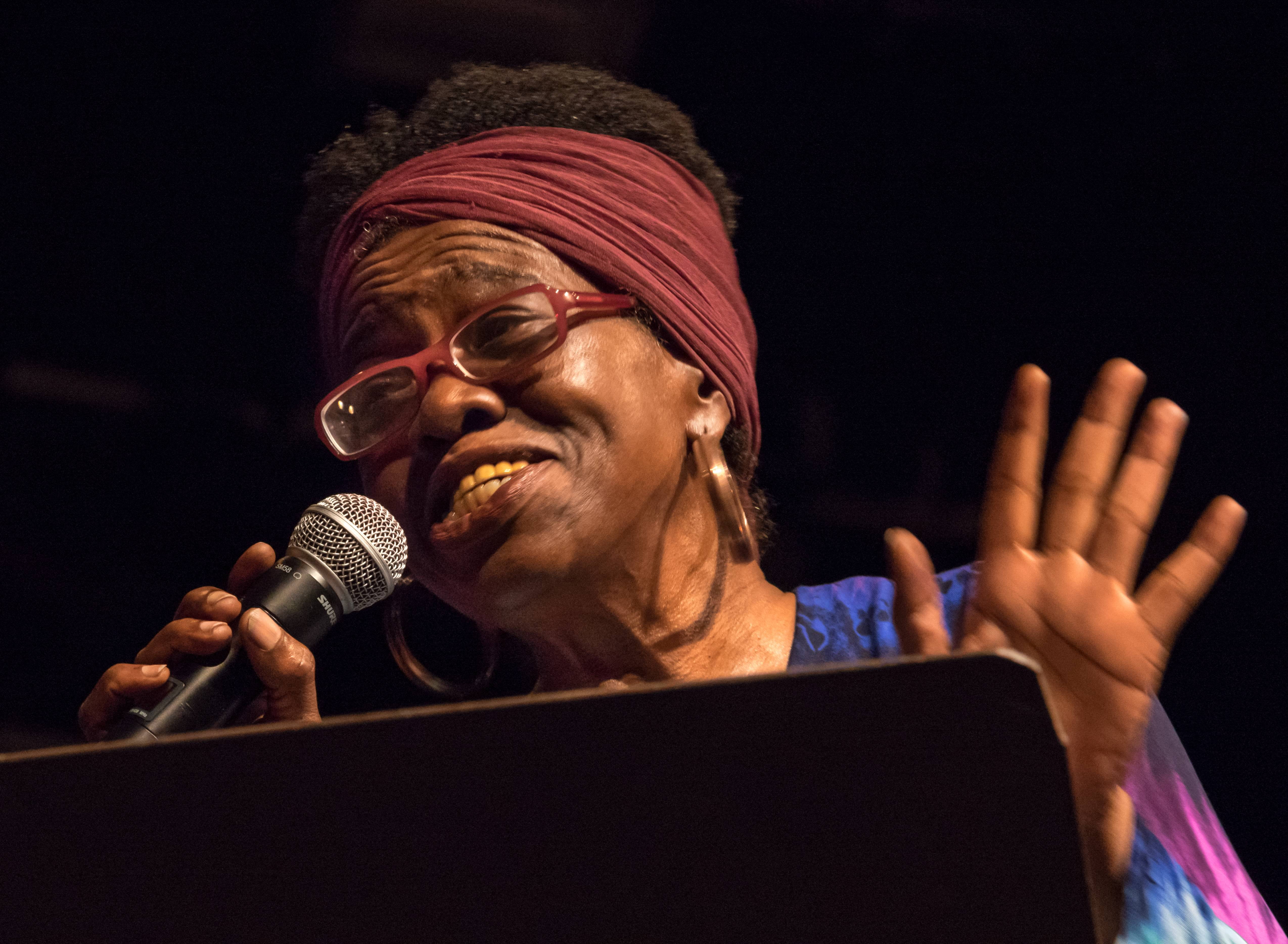 Bilder vom ZMF 2015 Die Gala am 12. 07. 2015